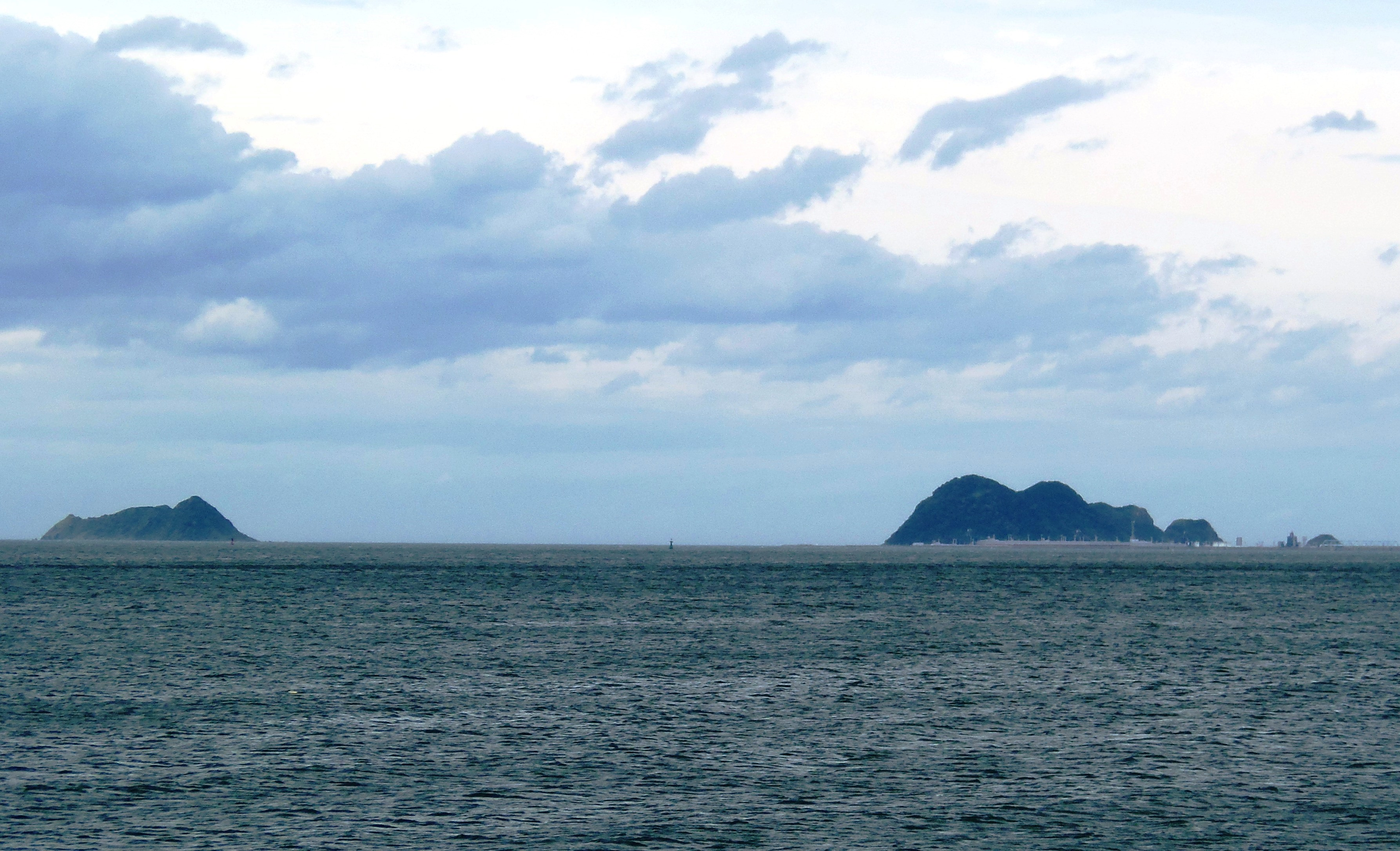 福岡県北九州市の白島です。 右が男島、左が女島です。